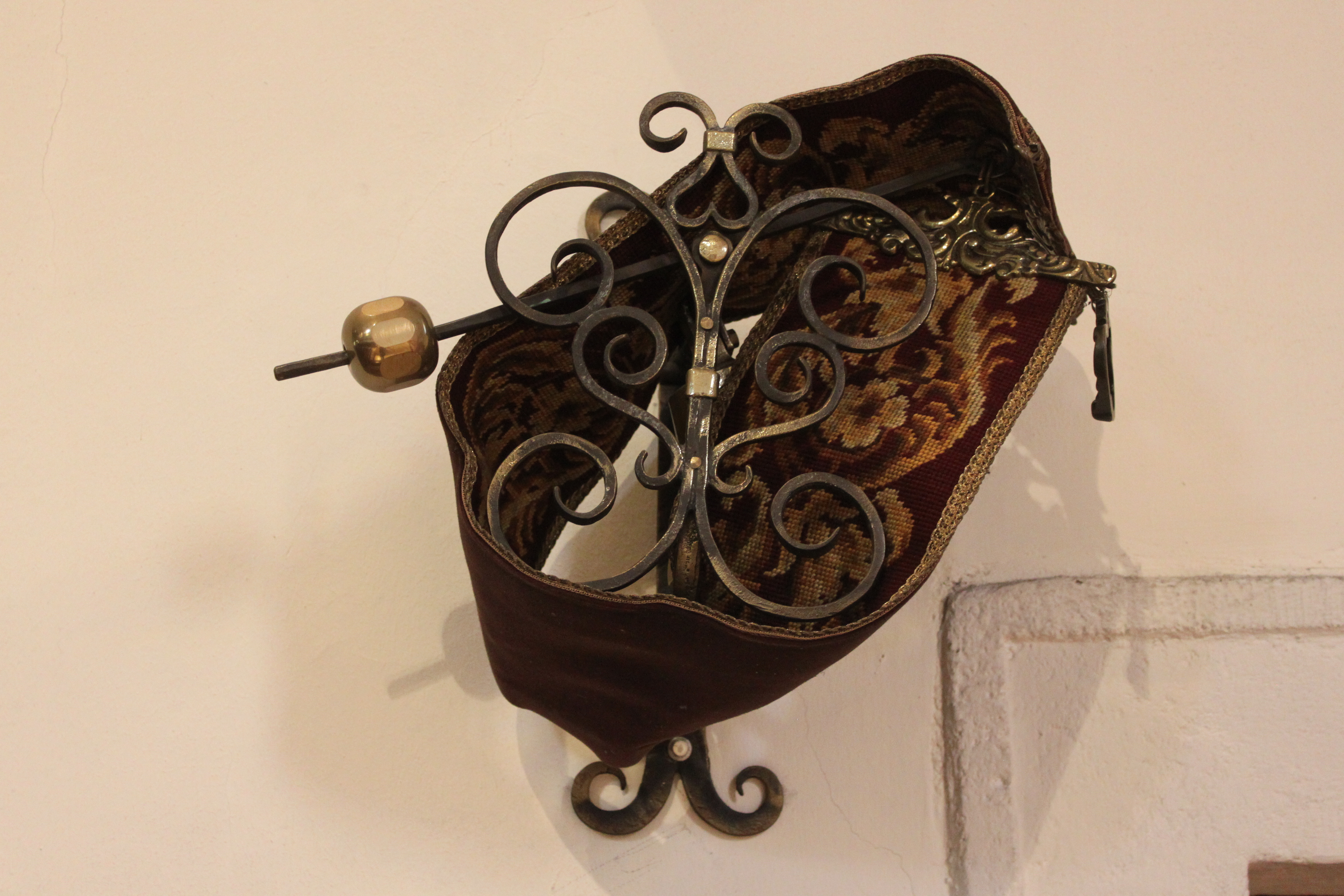 Kath. Pfarrkirche Mariae Geburt, Neudörfl; Wandglocke beim Sakristeiportal im Übergang vom Langhaus zum Chor für die Anzeige des Beginns der Gottesdienste. Am Karsamstag ist sie durch Aufwicklung des Klingelzugs stillgelegt, denn entsprechend einem verbreiteten Brauch werden zwischen der Abendmahlsmesse des Gründonnerstags und der Osternachtsfeier die Glocken nicht geläutet.